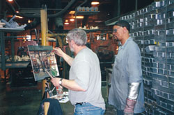 Tylle malt vor Ort bei Aceco, Milwaukee WI USA